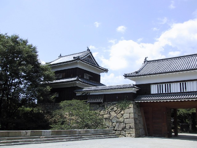 上田城 2001.07.31：投稿者自身による撮影